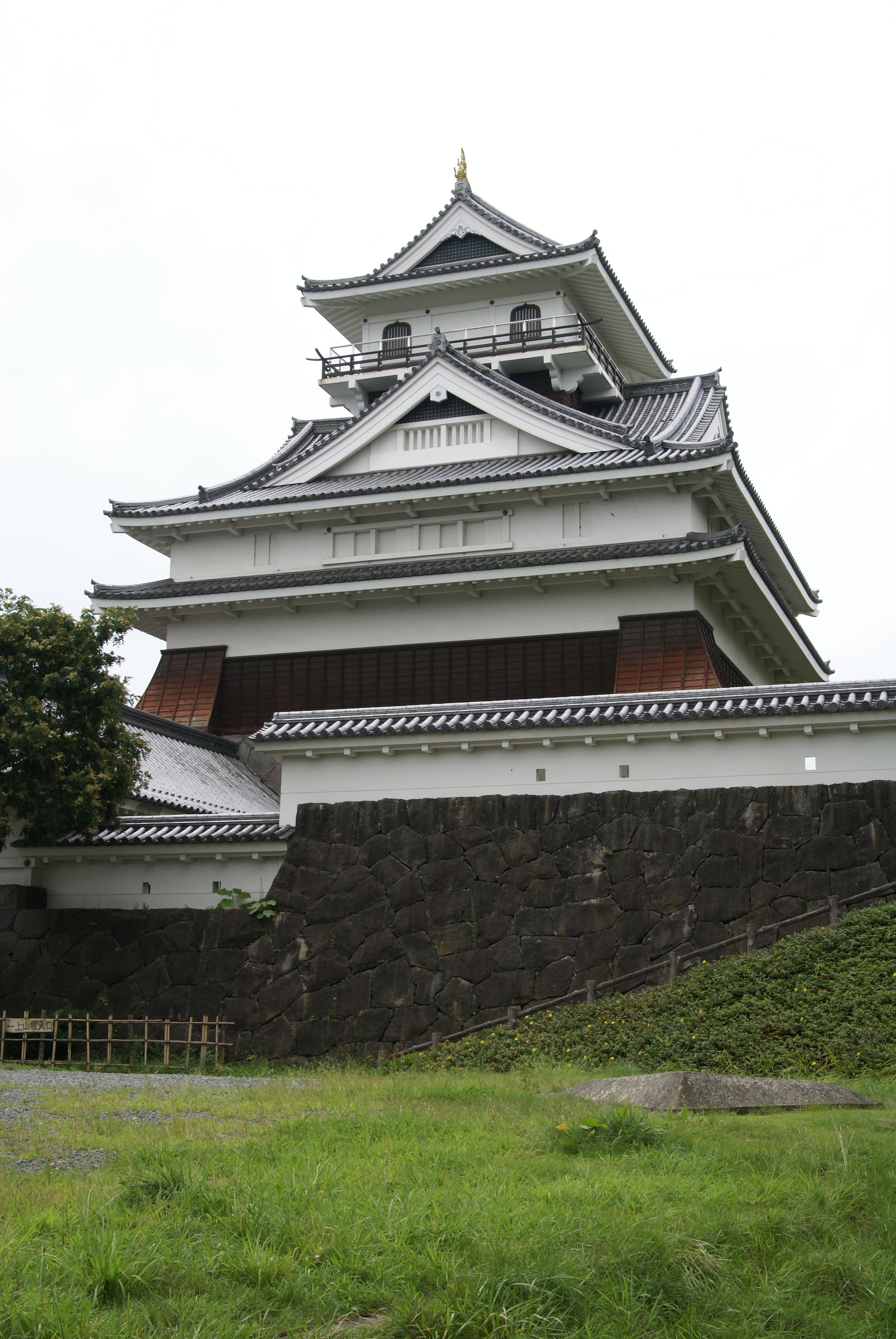 山形県 上山城模擬天守